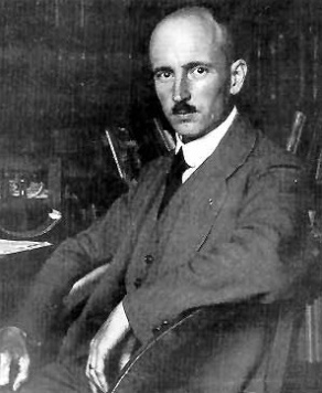 limnologo tedesco